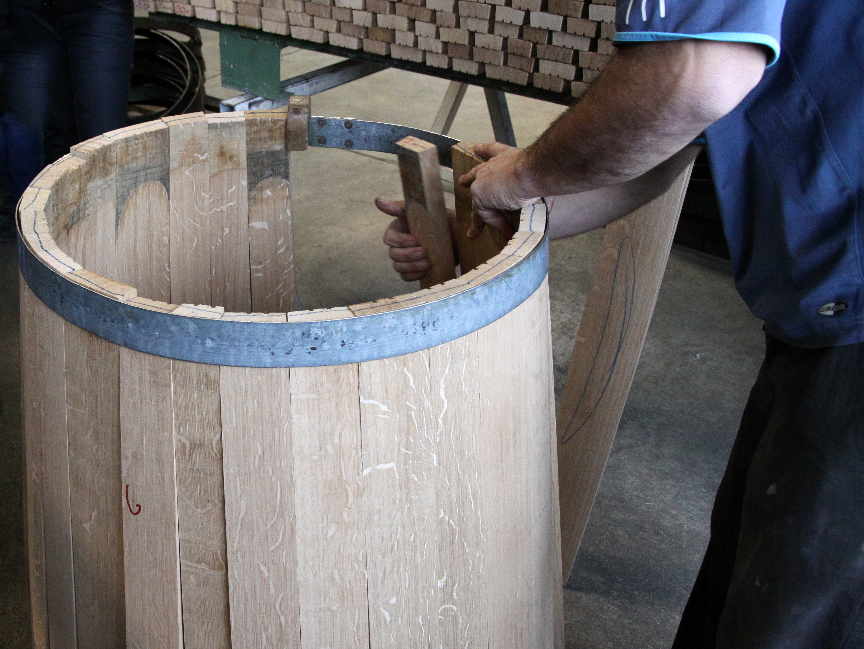 Assemblage des douelles